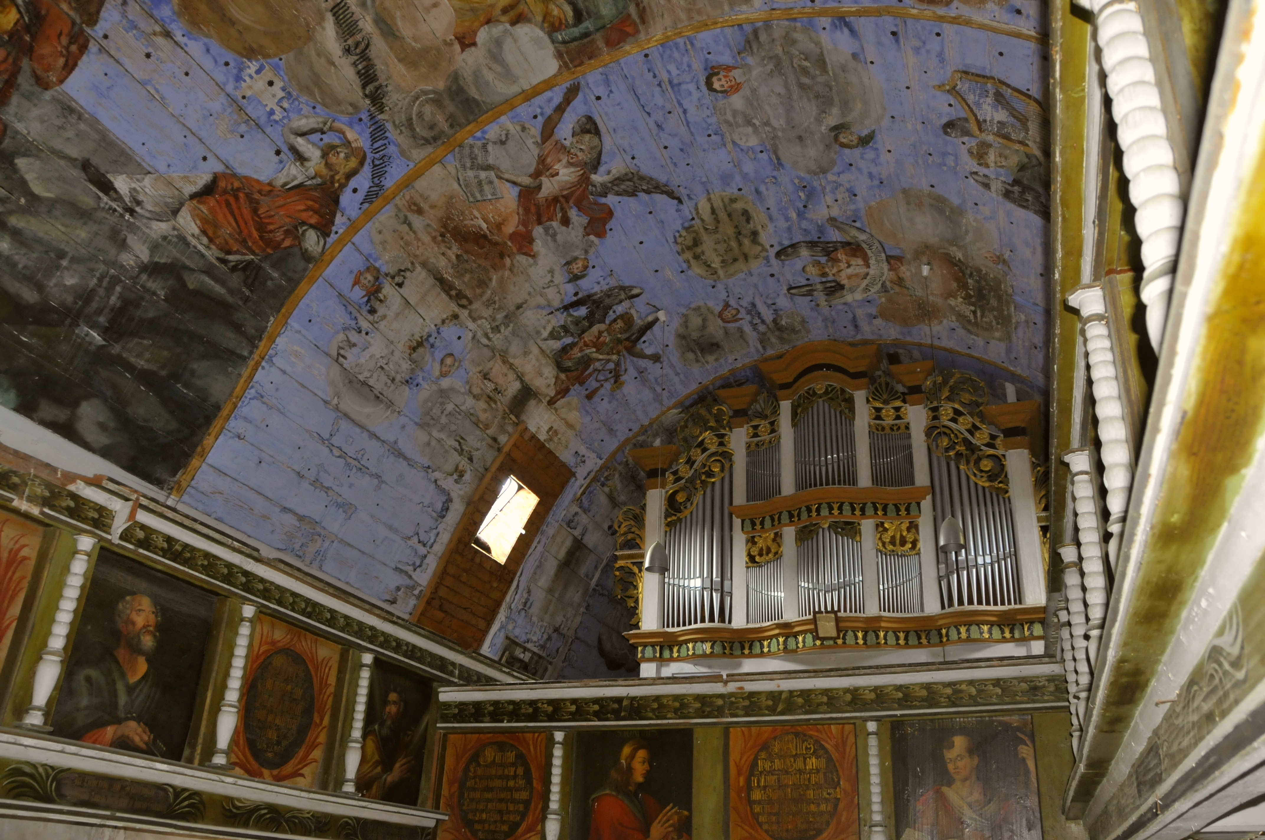 Alkersleben, Kirche